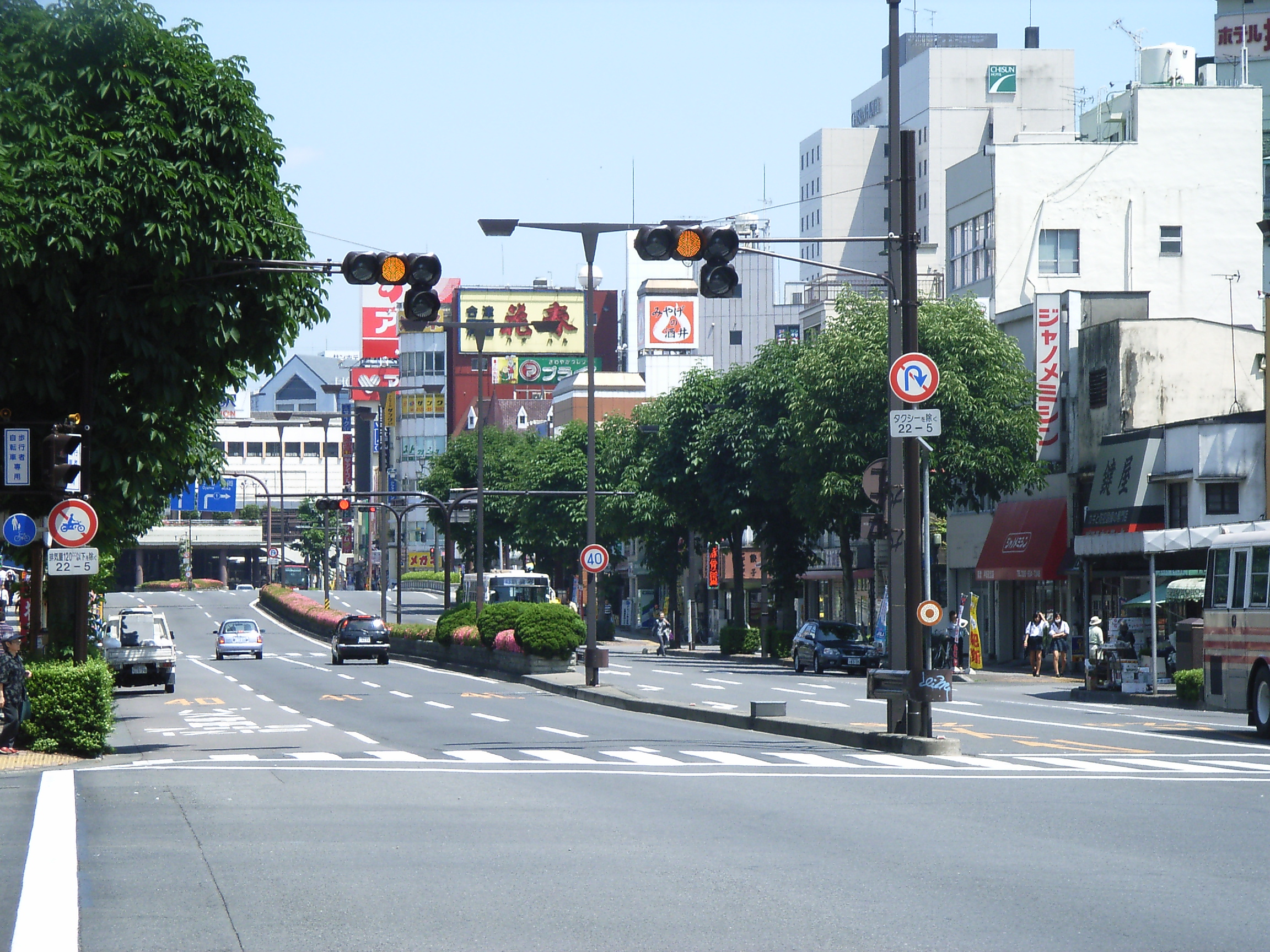 Tochigi Prefectural Road 10 Utsunomiya-Karasuyama Line. Utsunomiya, Japan.